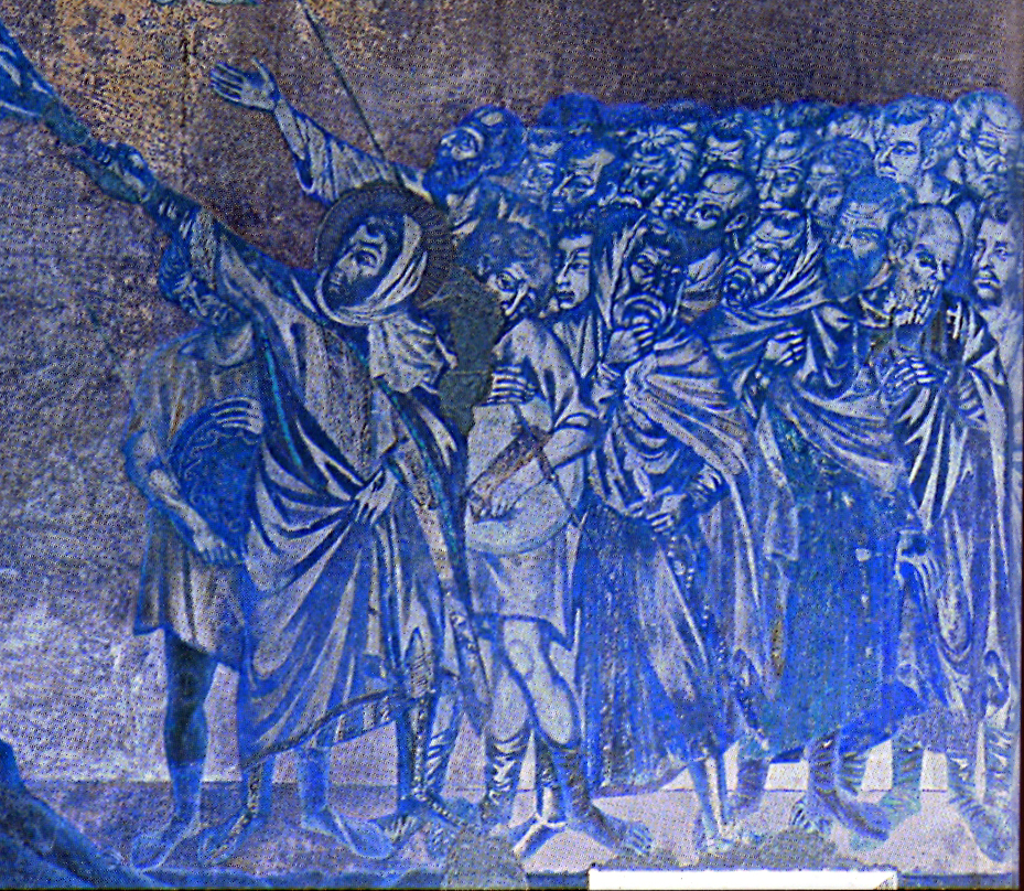 Cimabue, crocifissione del transetto sinistro, negativo, gruppo di dx